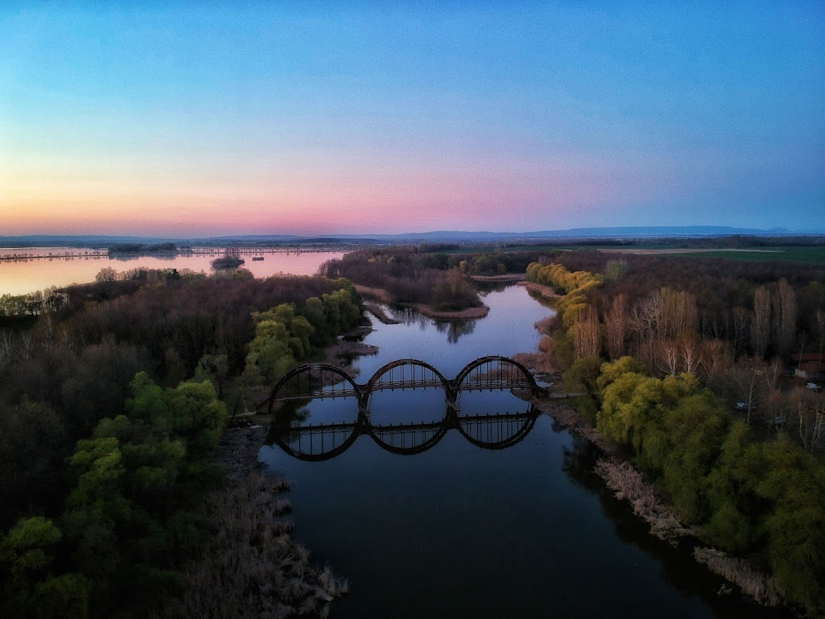 A Kányavári-híd alkonyatban